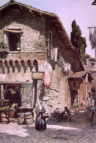 Via della Luce in Rome (rione Trastevere)